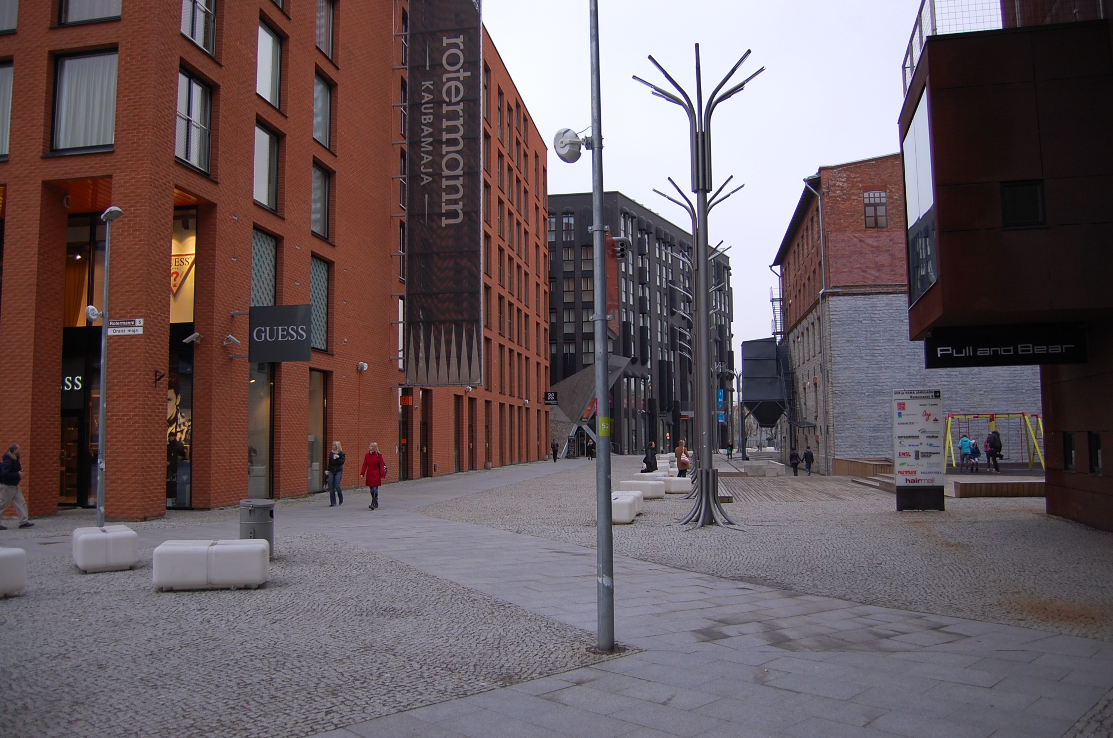 Rotermanni